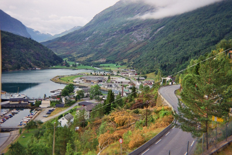 Hellesylt, Norway